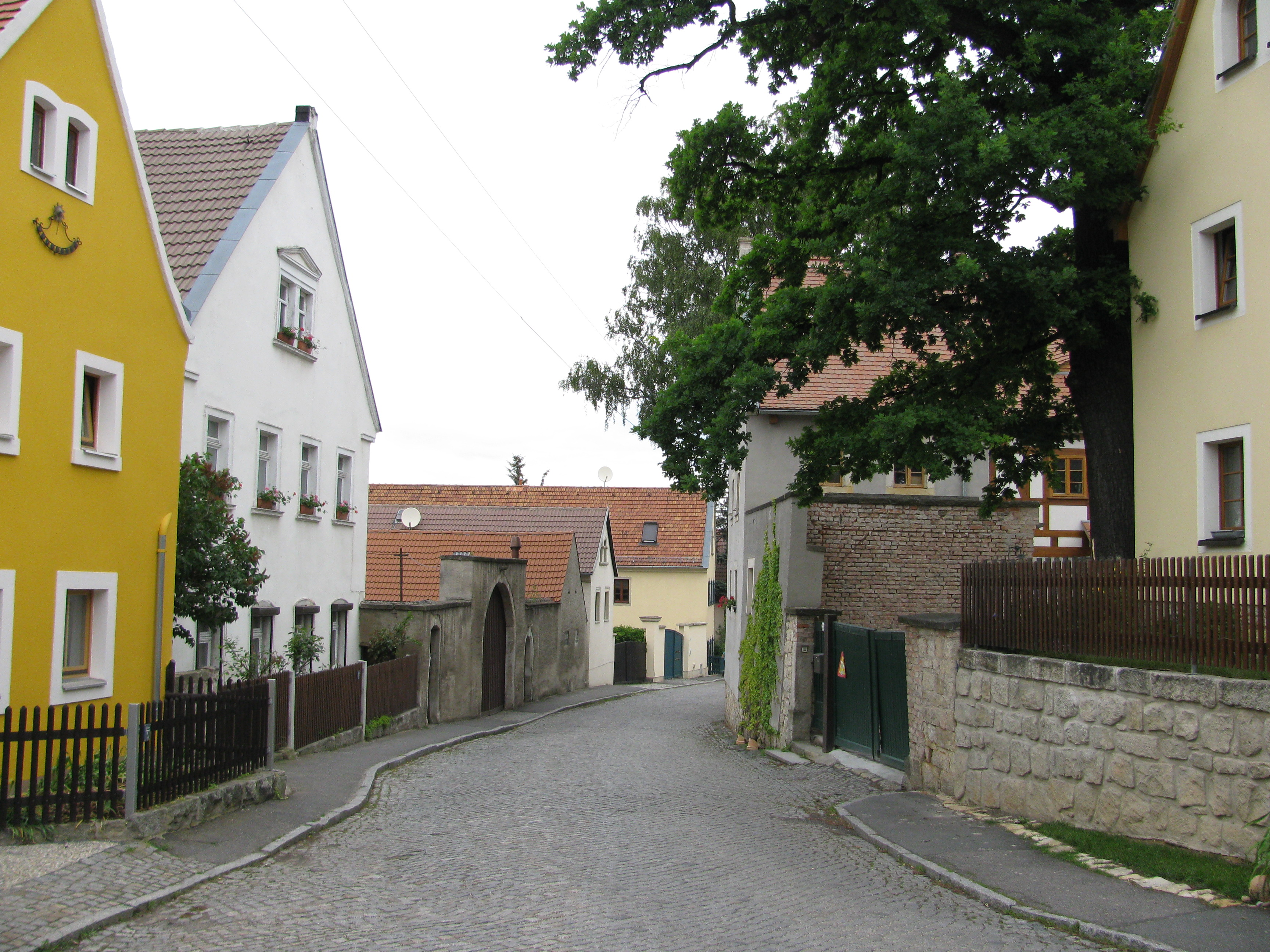 Gebäude im Dorfkern von Gostritz ("Altgostritz"), Landeshauptstadt Dresden